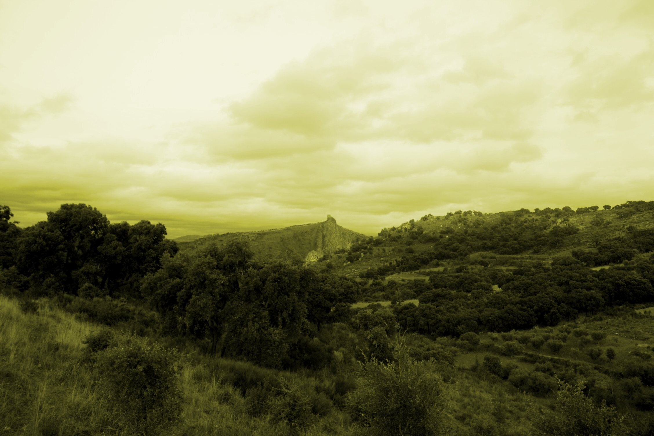 Vista de Sul. This monument is classified as Imóvel de Interesse Público. This file was uploaded for Wiki Loves Monuments in Portugal with the unique identifier 74124.